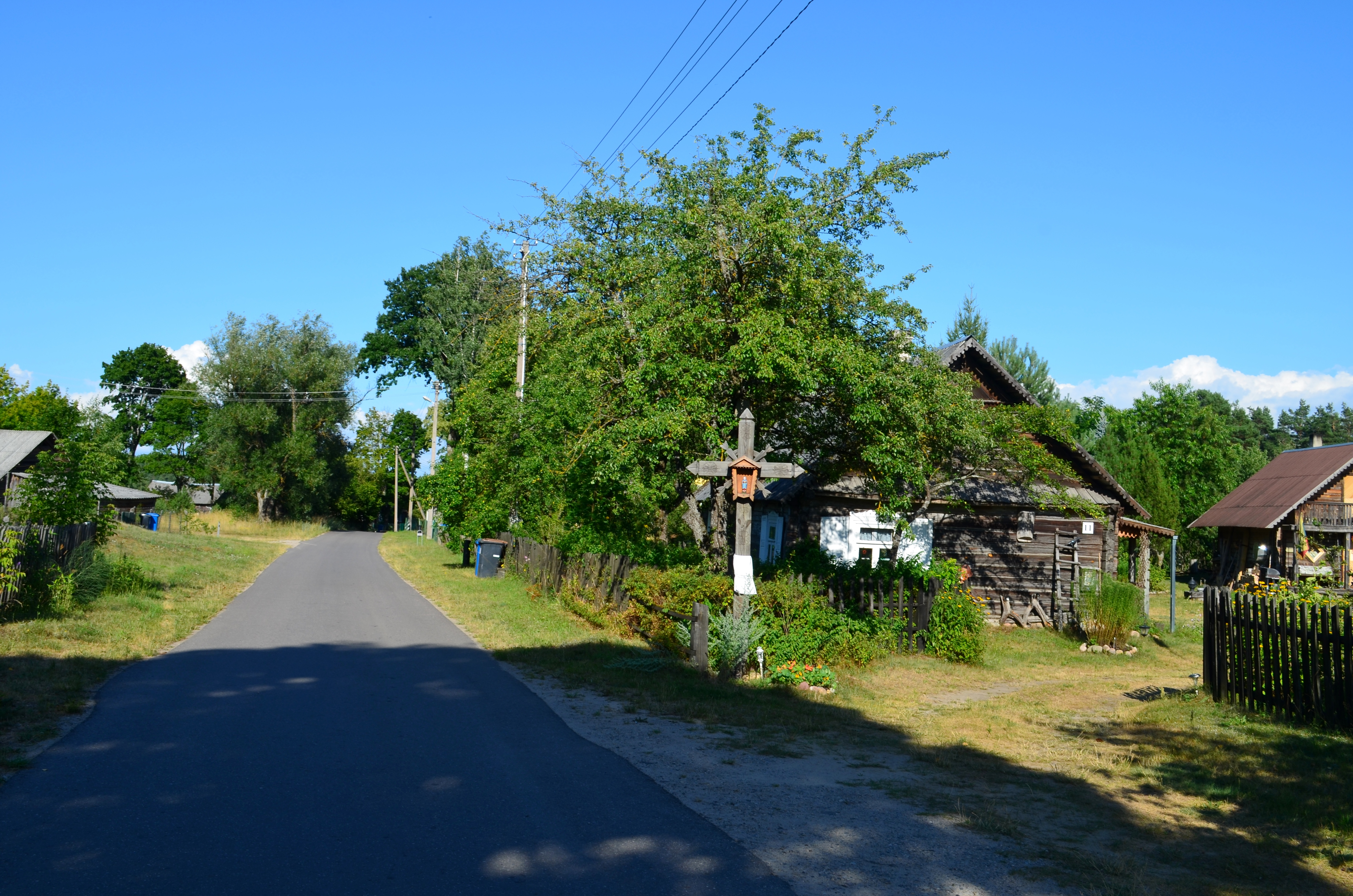 Margionys, Varėnos r.